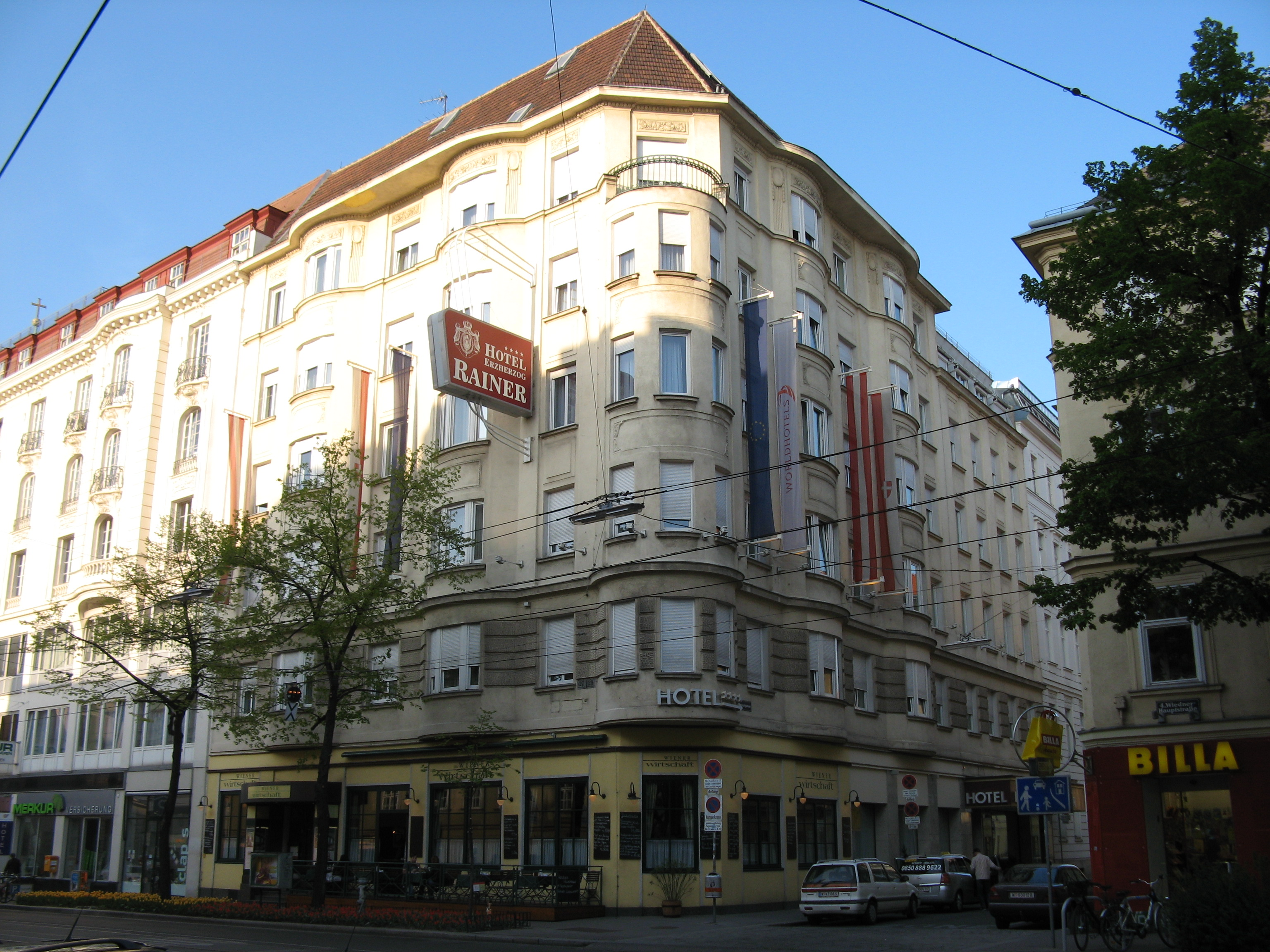 Hotel Erzherzog Rainer (1912), Wiedner Hauptstraße 27, Wien-Wieden